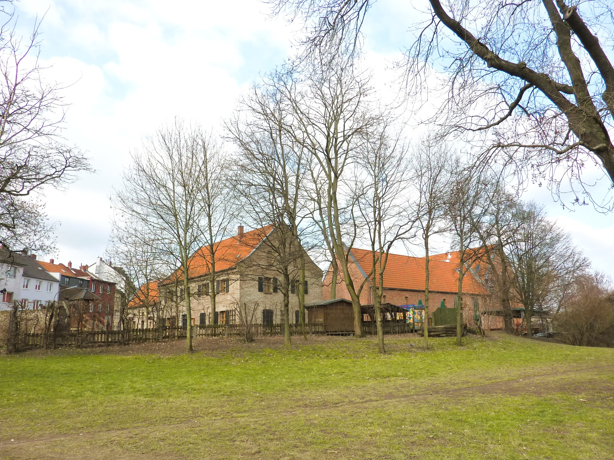 Altenberger Hof, Köln-Nippes